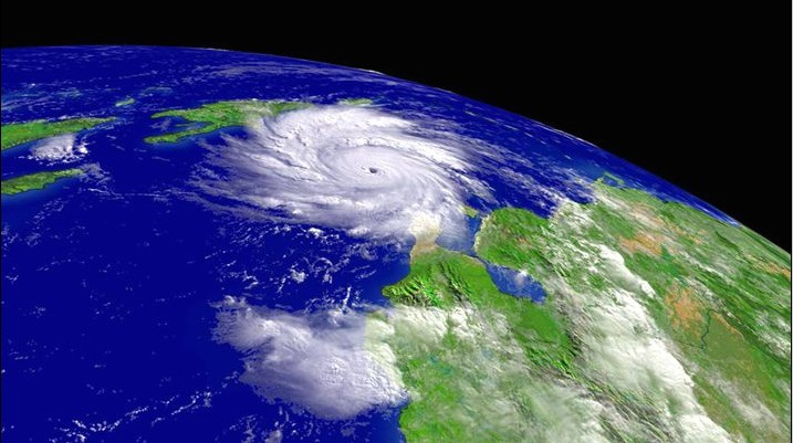 Orkaan Ivan boven de Carische Zee. Satelietbeeld van NOAA